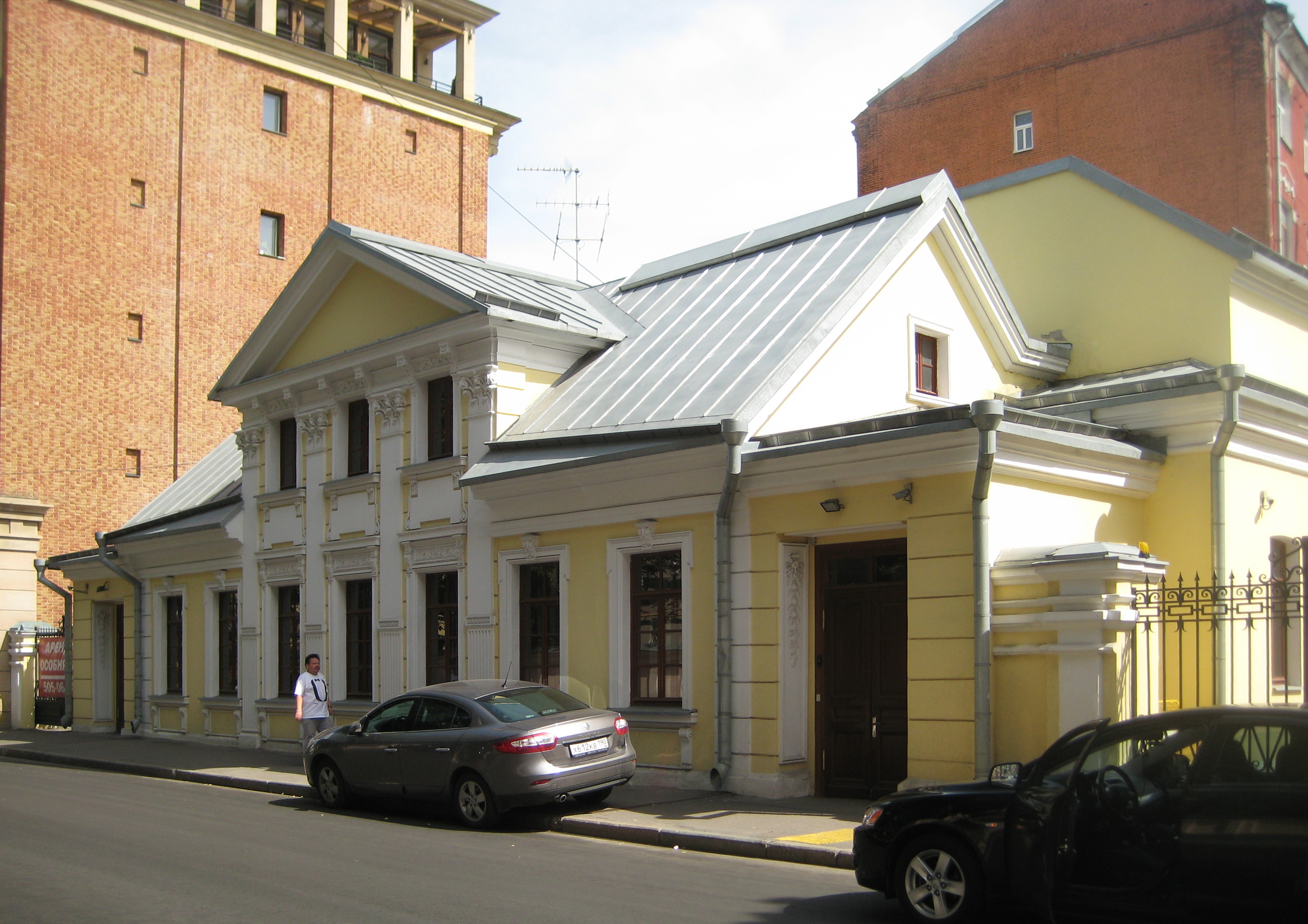 Кропоткинский пер., 28/15 строение 1-3 Большой Левшинский № 15/28, стр. 1, 2, 3 Городская усадьба Е. Н. Богданова - Е. В. Белоусовой - В. И. Сучковой, XIX в. (Москва) Архитекторы: В. А. Шимановский, И. П. Машков. Жилой дом (стр. 1), 1818 г., 1856 г., 1891 г., архитектор: И. П. Машков. Службы (каретник, стр. 3), 1886 г., архитектор: В. А. Шимановский. Городская усадьба Е. Н. Богданова — Е. В. Белоусовой — В. И. Сучковой (1818; 1856; 1886, архитектор В. А. Шимановский; 1891, архитектор И. П. Машков), объект культурного наследия регионального значения